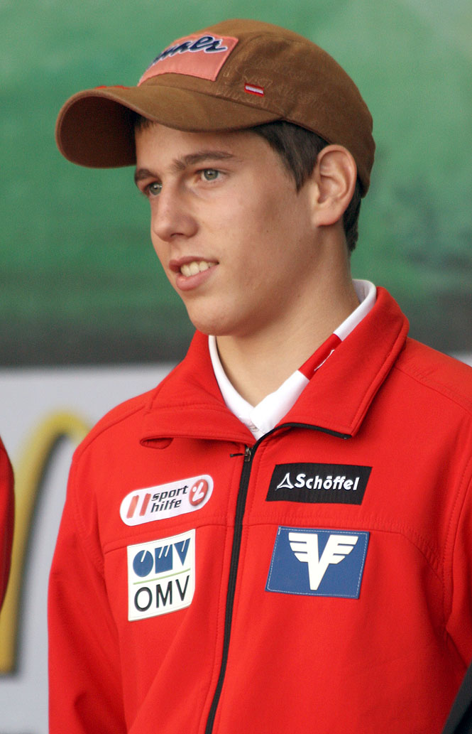 Lukas Müller am Tag des Sports 2009 auf dem Heldenplatz in Wien